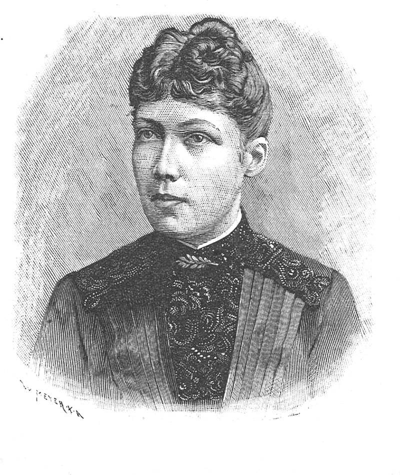 Constance Elbe (1864-1935)